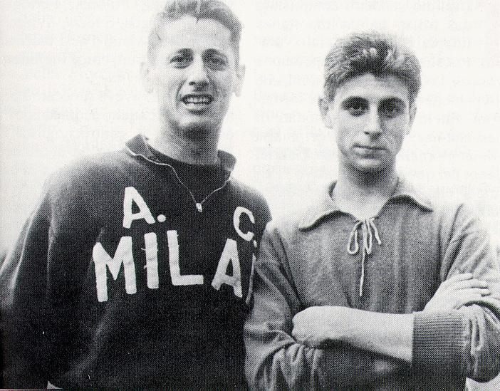 I calciatori Juan Alberto Schiaffino e Gianni Rivera nel 1960. Licensing 1960 1960 1960